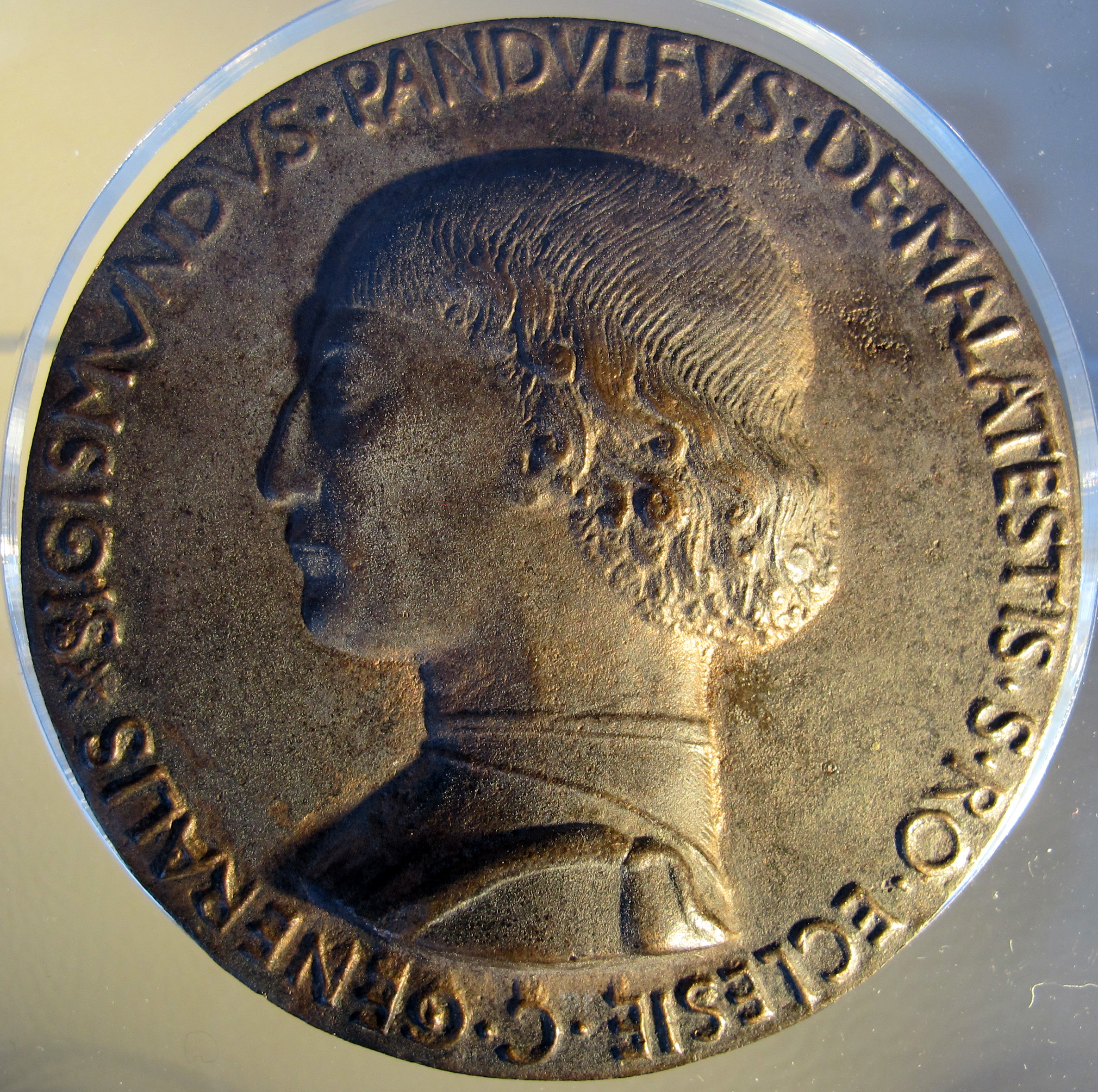 Matteo de' pasti, medaglia di s. p. malatesta con castel sismondo, recto, 'sigismvndvs' 02 da castel sismondo